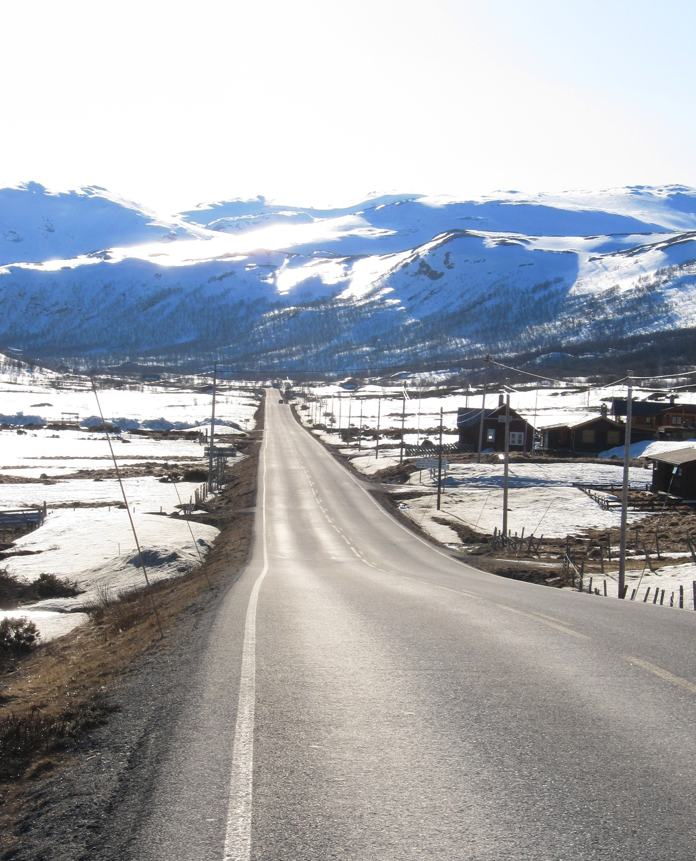 Filefjell med E16 ved Kyrkjestølane sett vestover.